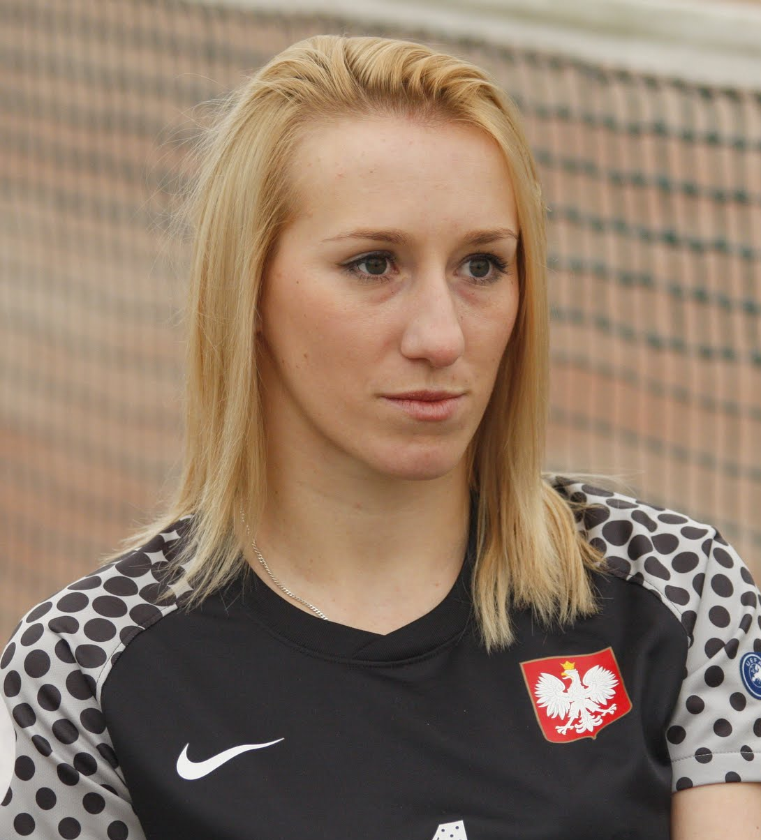 Katarzyna Kiedrzynek